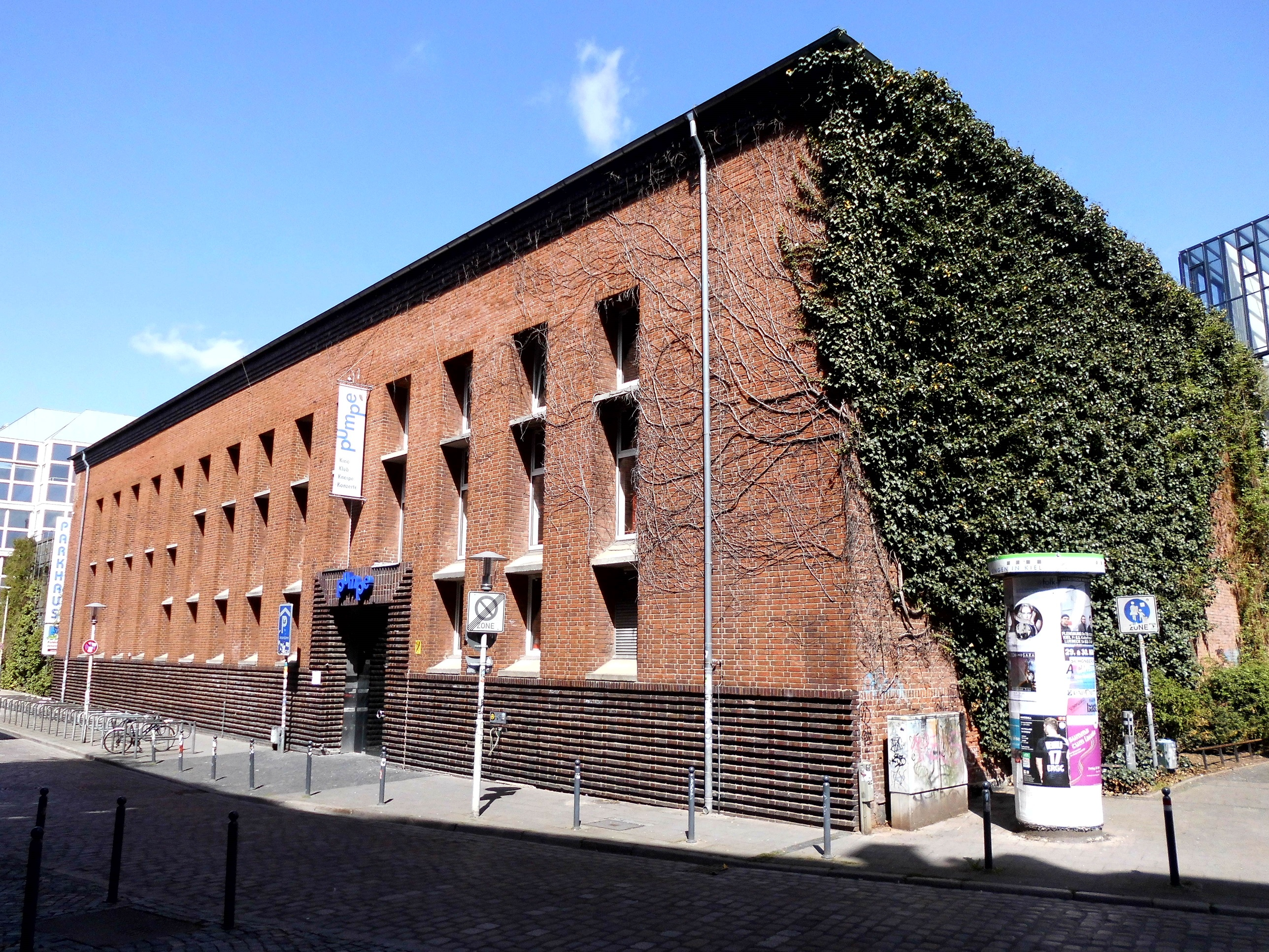 Kulturzentrum "Pumpe" im Kieler Stadtteil Altstadt.